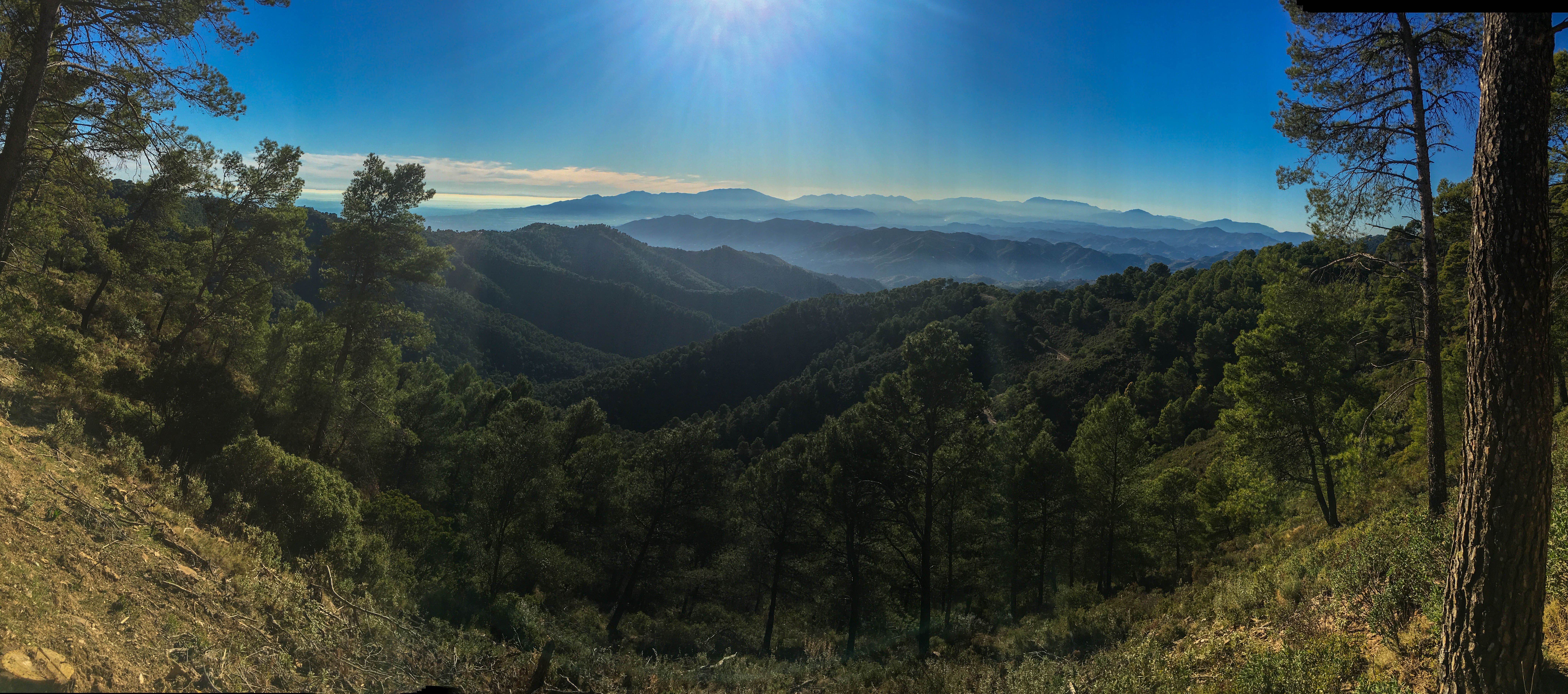 Montes de Málaga This is a photography of a Site of Community Importance in Spain with the ID: ES6170038. Natura2000 entry, EEA entry